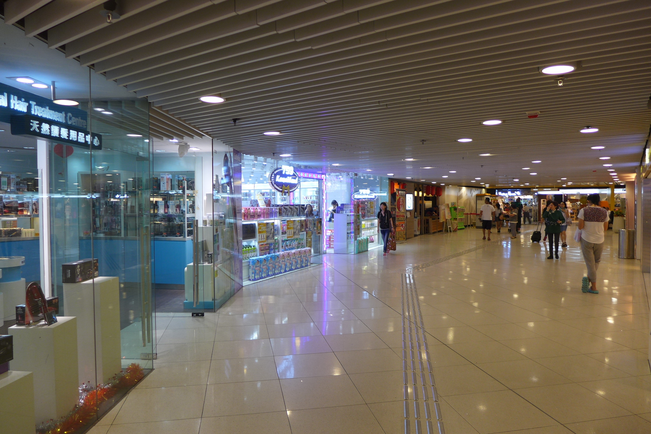 Lek Yuen Plaza